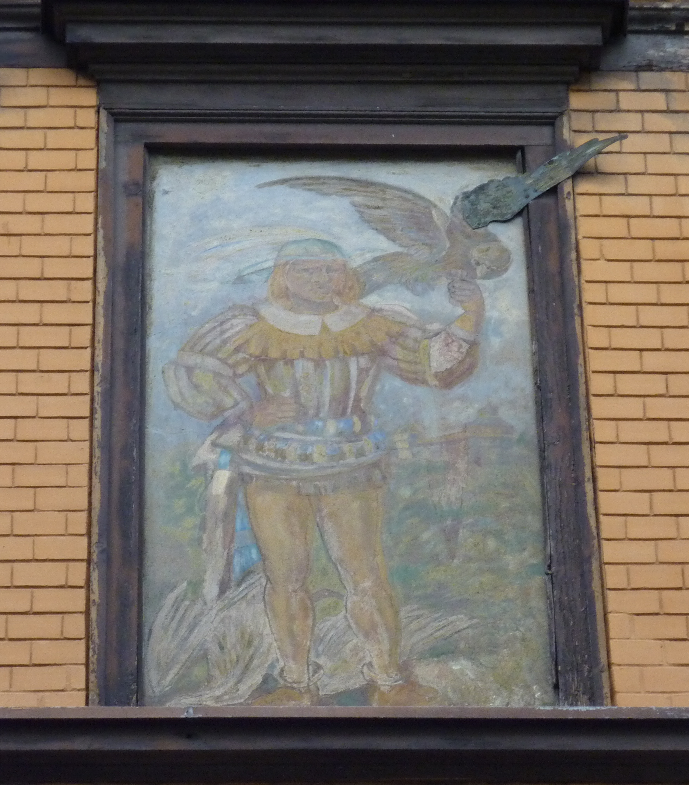 Falknerdarstellung in einem Blindfenster im ehemaligen Gasthof Falken in Esslingen